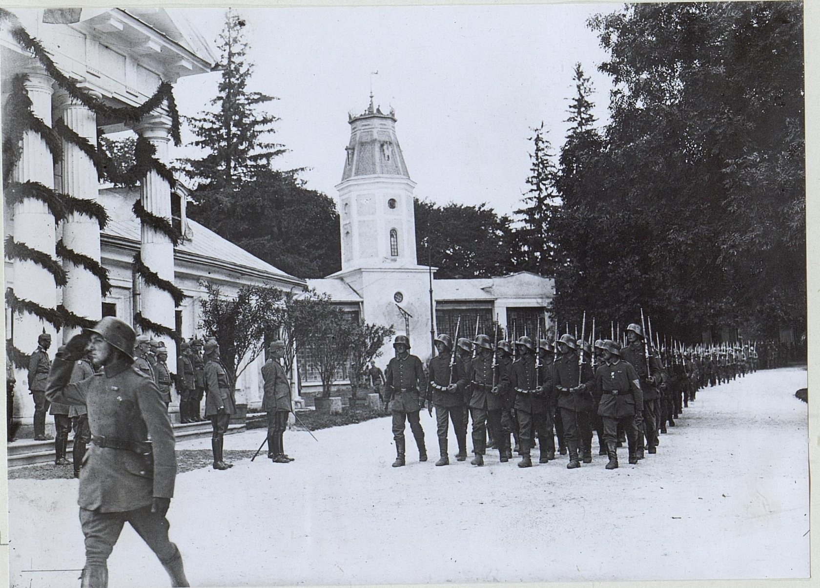 Besuch S.M.des Königs Friedrich August v.Sachsen 6.9.1917 in Chorostkow.